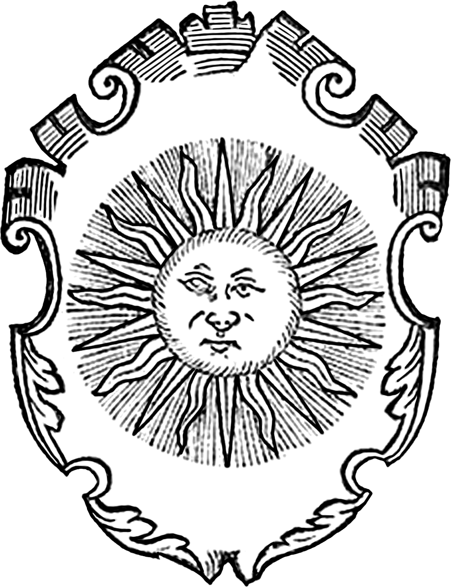 Герб Подольского воеводства 1578